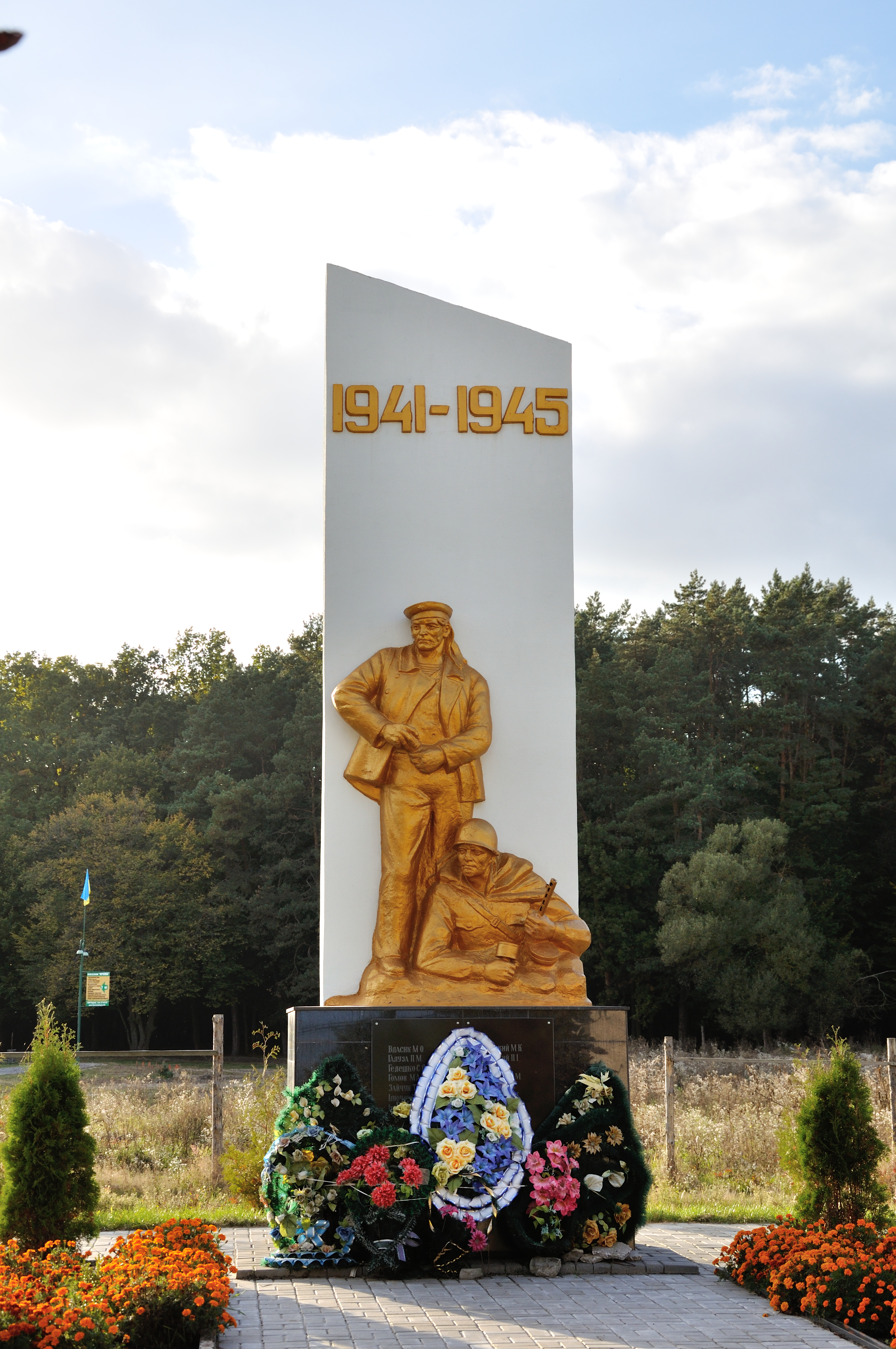 Пам’ятник воїнам- односельчанам і жертвам УБН, смт. Оржів